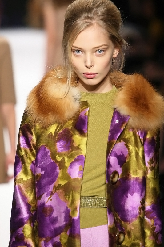 Tanya Dziahileva February 2008 at Michael Kors